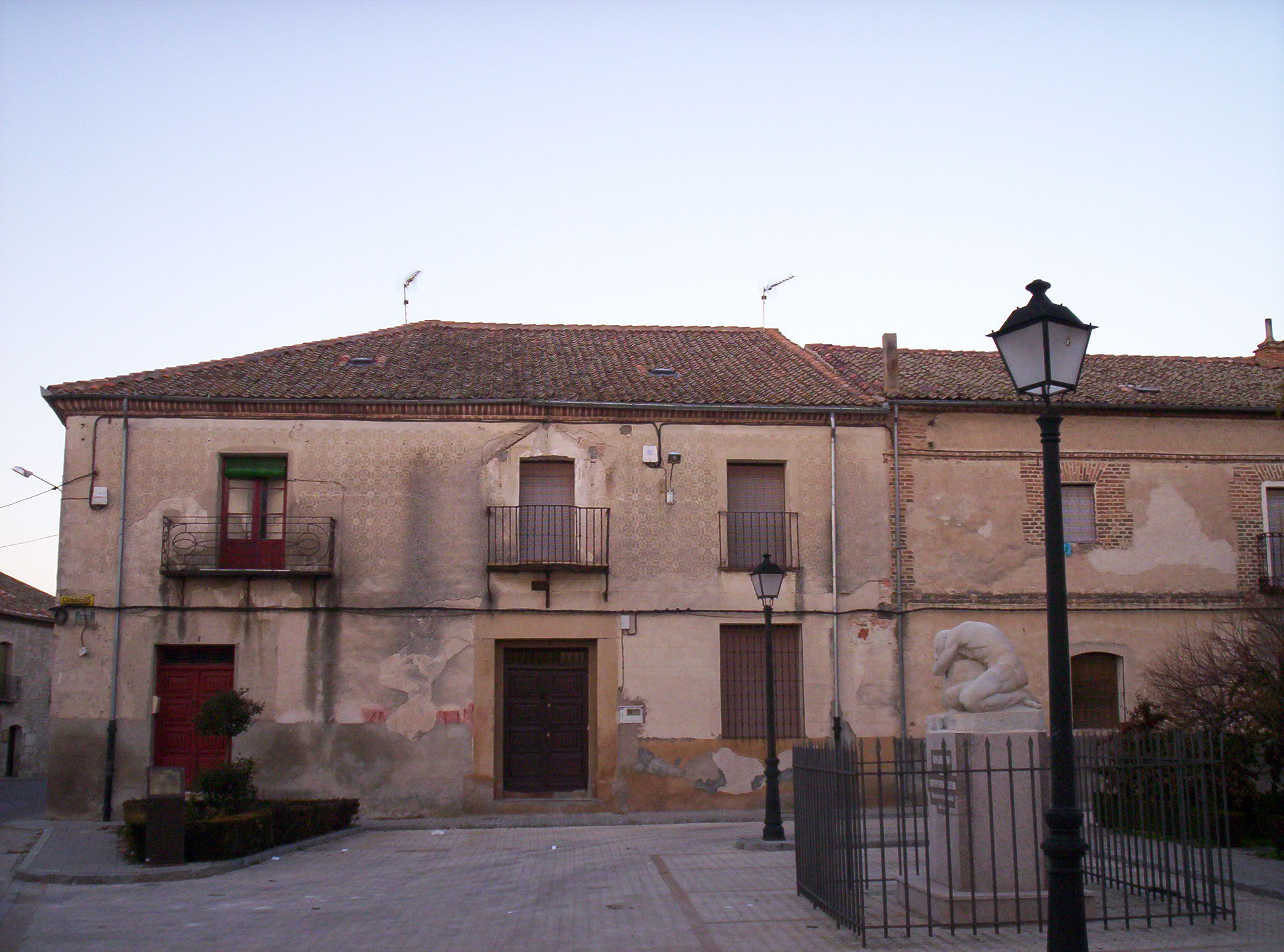 Casas del Obispo, junto al Ayuntamiento de Aguilafuente (Segovia). Frente a ellas, escultura Adán arrepentido, de Florentino Trapero, artista local.